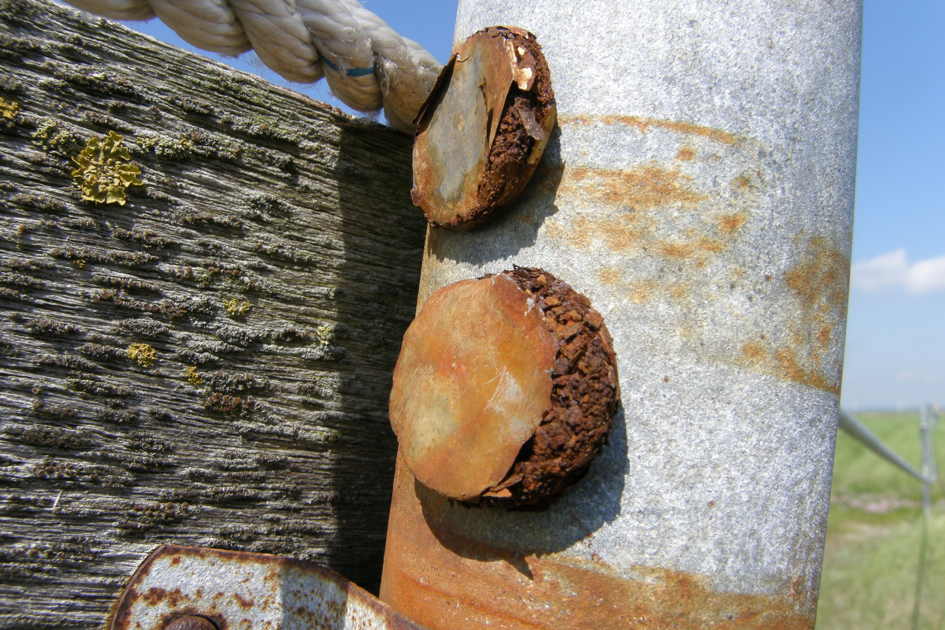 Die Supermagnete habe ich bei meiner Cachekontrolle im Dezember direkt an der Küste vergessen. 5 Monate später sehen sie so aus ;-)